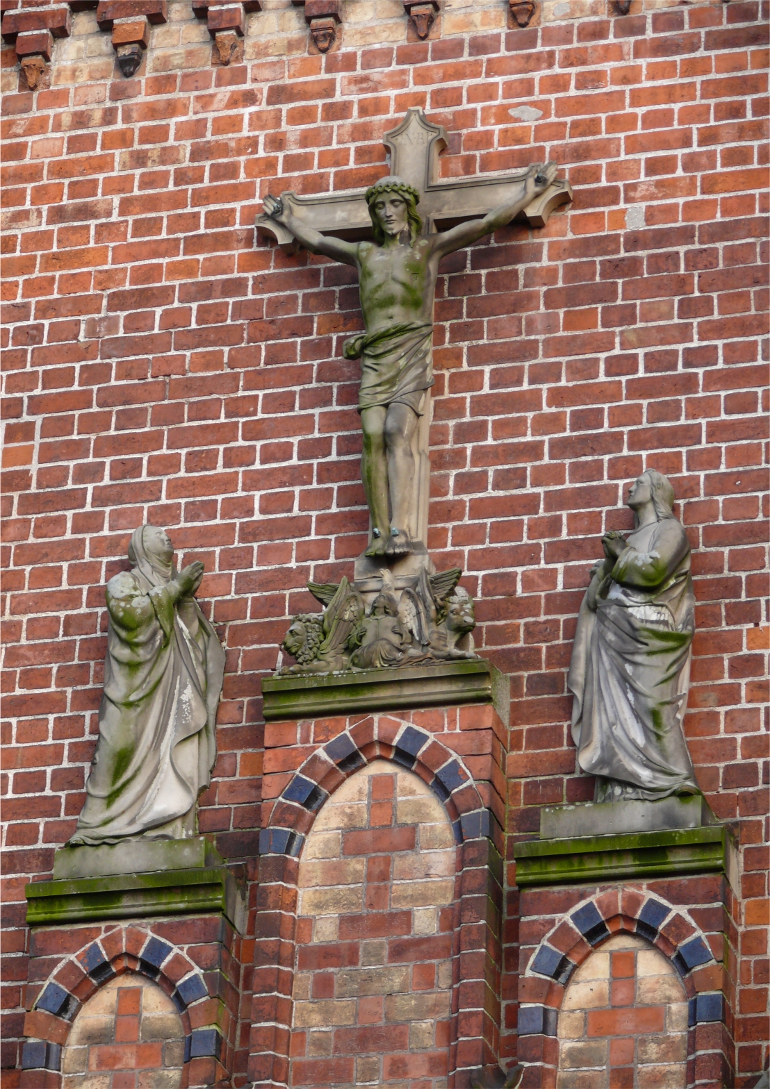 Röbel (Müritz) Marienkirche: Christusgruppe (Kruzifix, Maria, Johannes) von Bildhauer Scholinus nach Entwurf von Gaston Lenthe